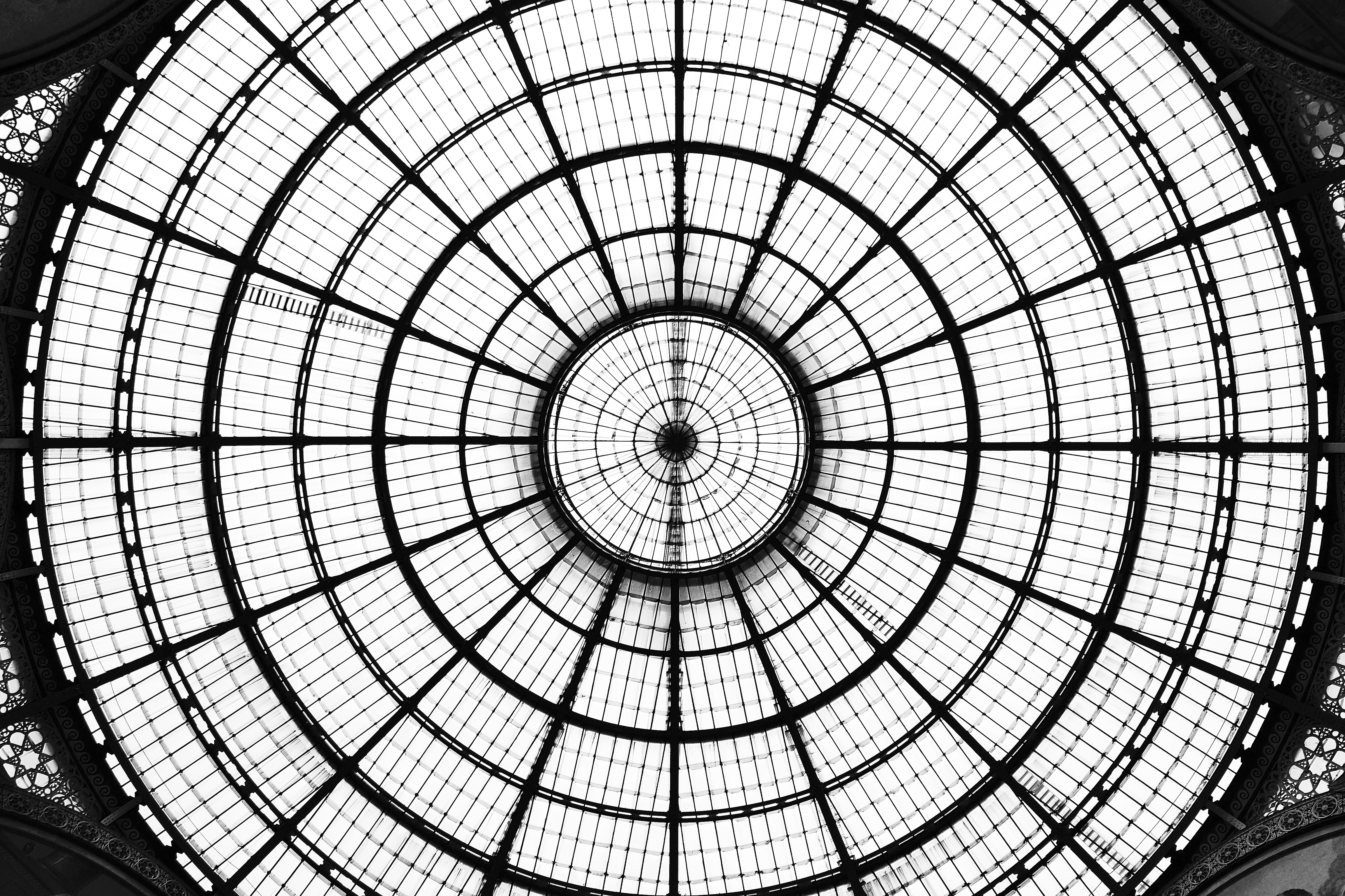 Galleria Vittorio Emanuele II This is a photo of a monument which is part of cultural heritage of Italy.